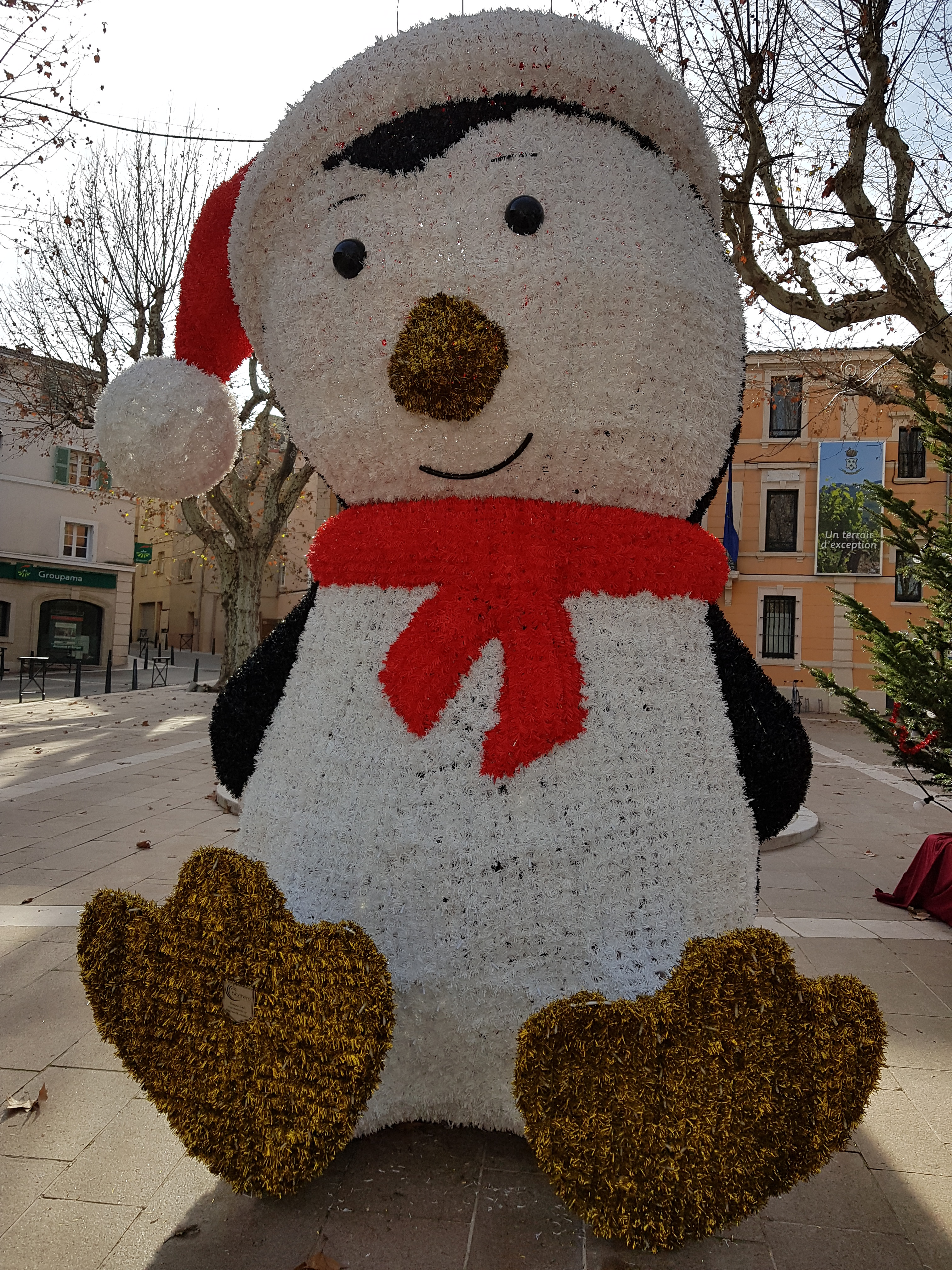 La commune de Trets fête Noël à sa façon.